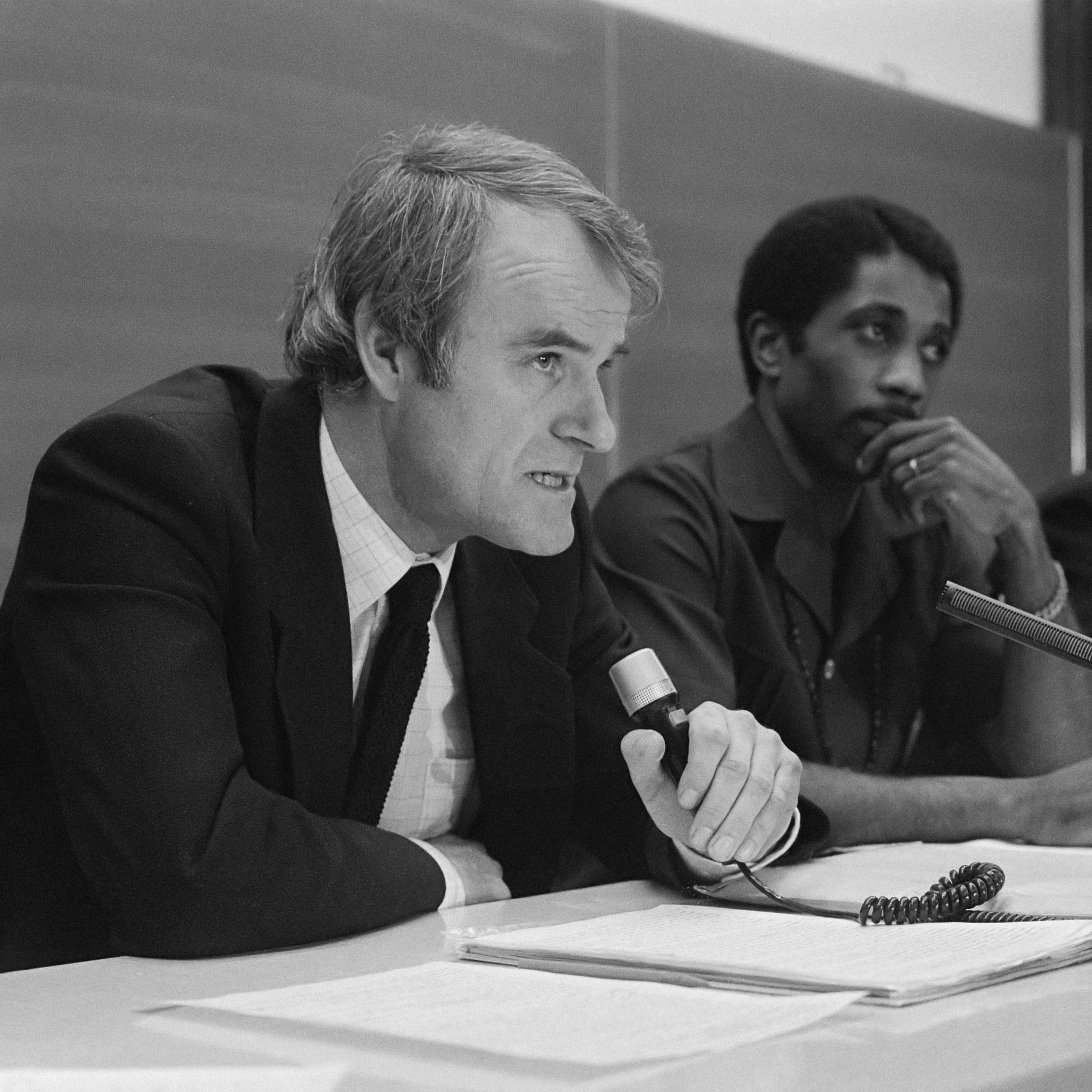 Amsterdam, Prinsenhof conferentie over discriminatie en racisme; commissaris Riessen (Bijlmermeer) aan het woord 26 januari 1984